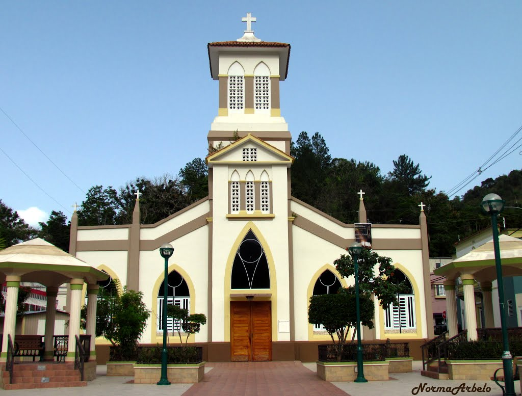 Parroquia San Juan Bautista de Orocovis, Puerto Rico